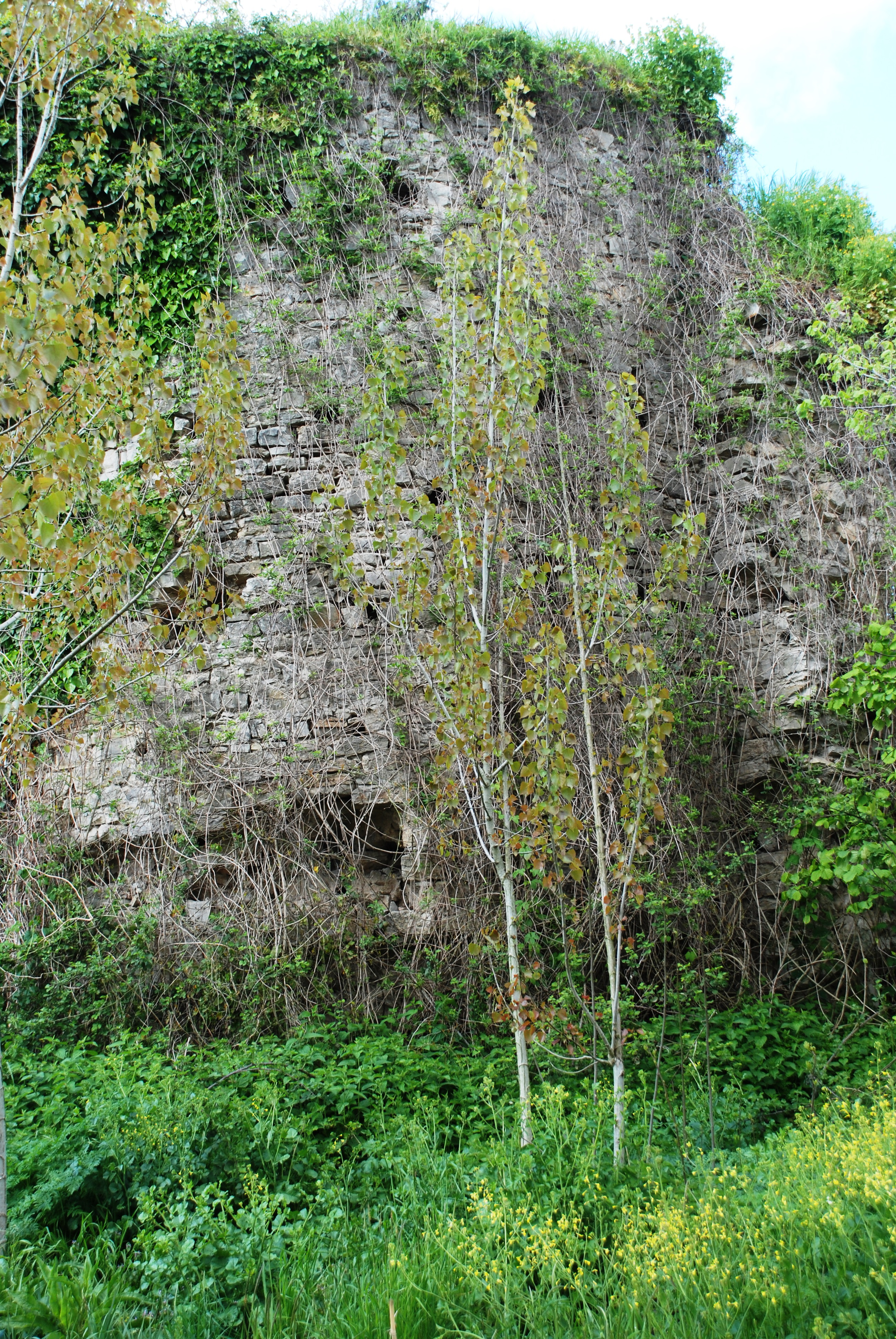 Sakarya, Ferizli, Seyifler Köyünde, 12.yüzyıla ait Bizans kale kalıntısı.